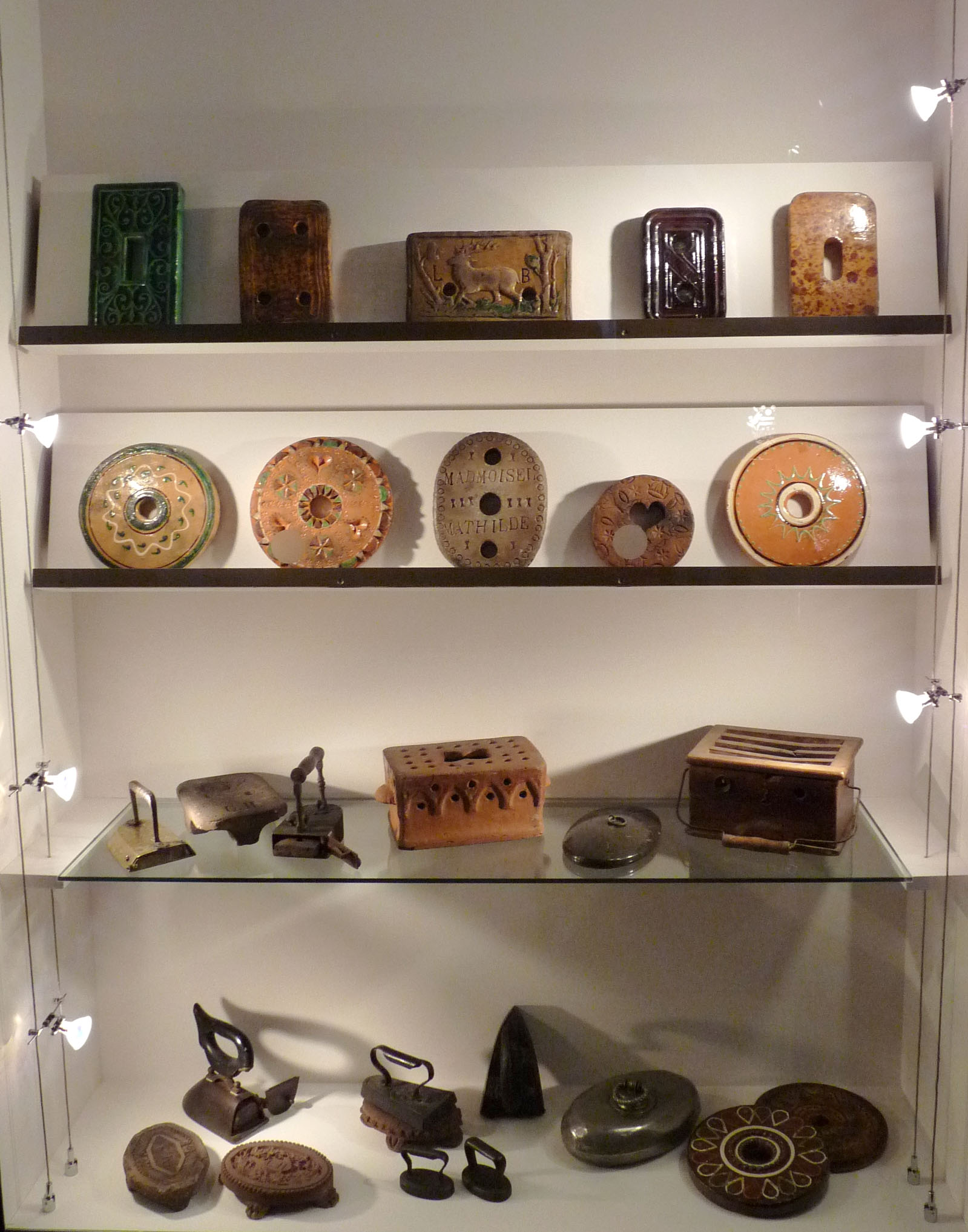 Musée alsacien de Strasbourg : briques chauffe-lits (Bettstein), fers à repasser, chaufferettes, bouillotes